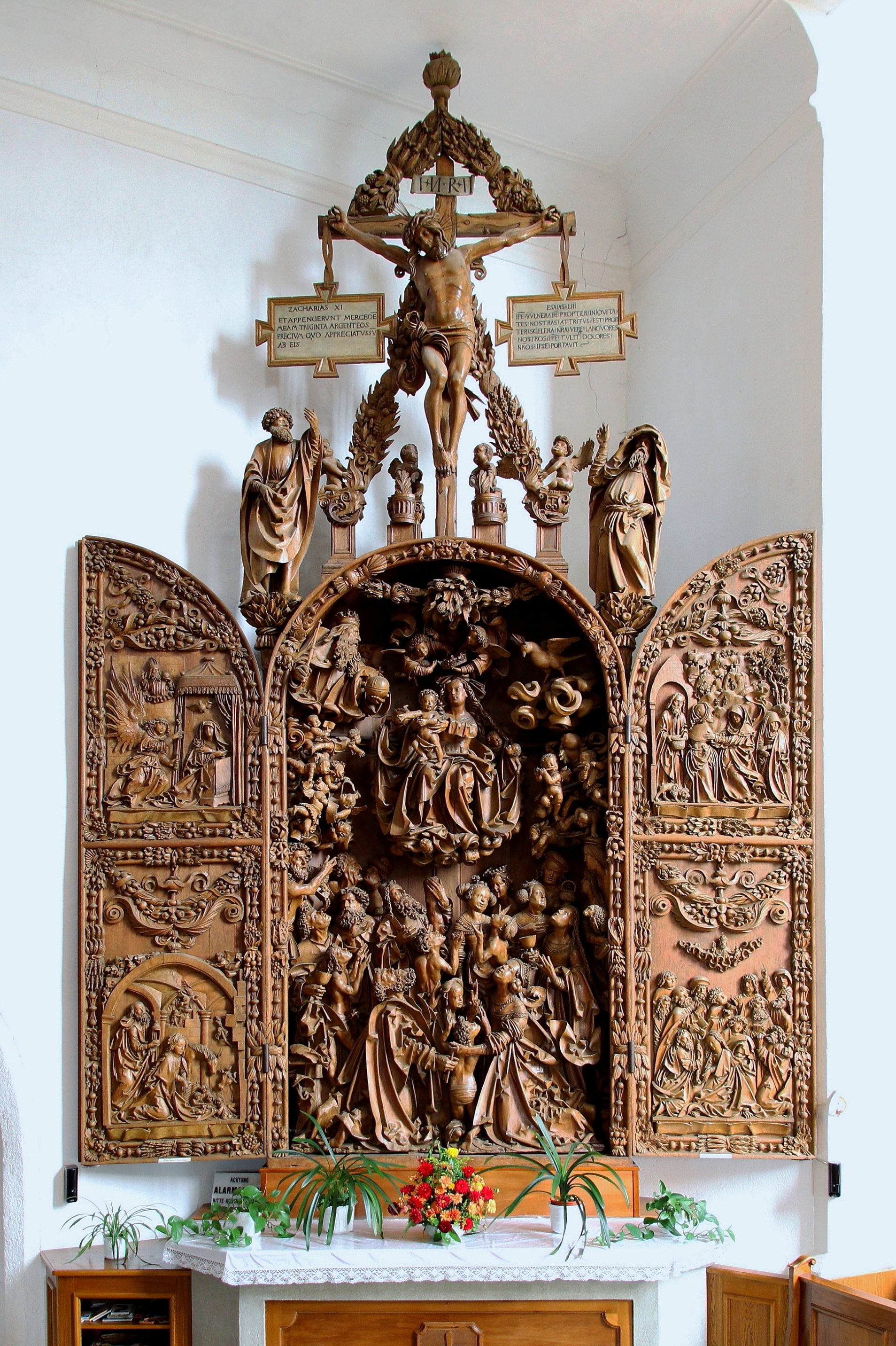 Holzflügelaltar in der röm.-kath. Pfarrkirche Mariae Namen von Mauer bei Melk, ein Ortsteil der niederösterreichischen Gemeinde Dunkelsteinerwald. Der spätgotische Schnitzaltar aus Lindenholz ist von einem unbekannten Meister und entstand um 1510.